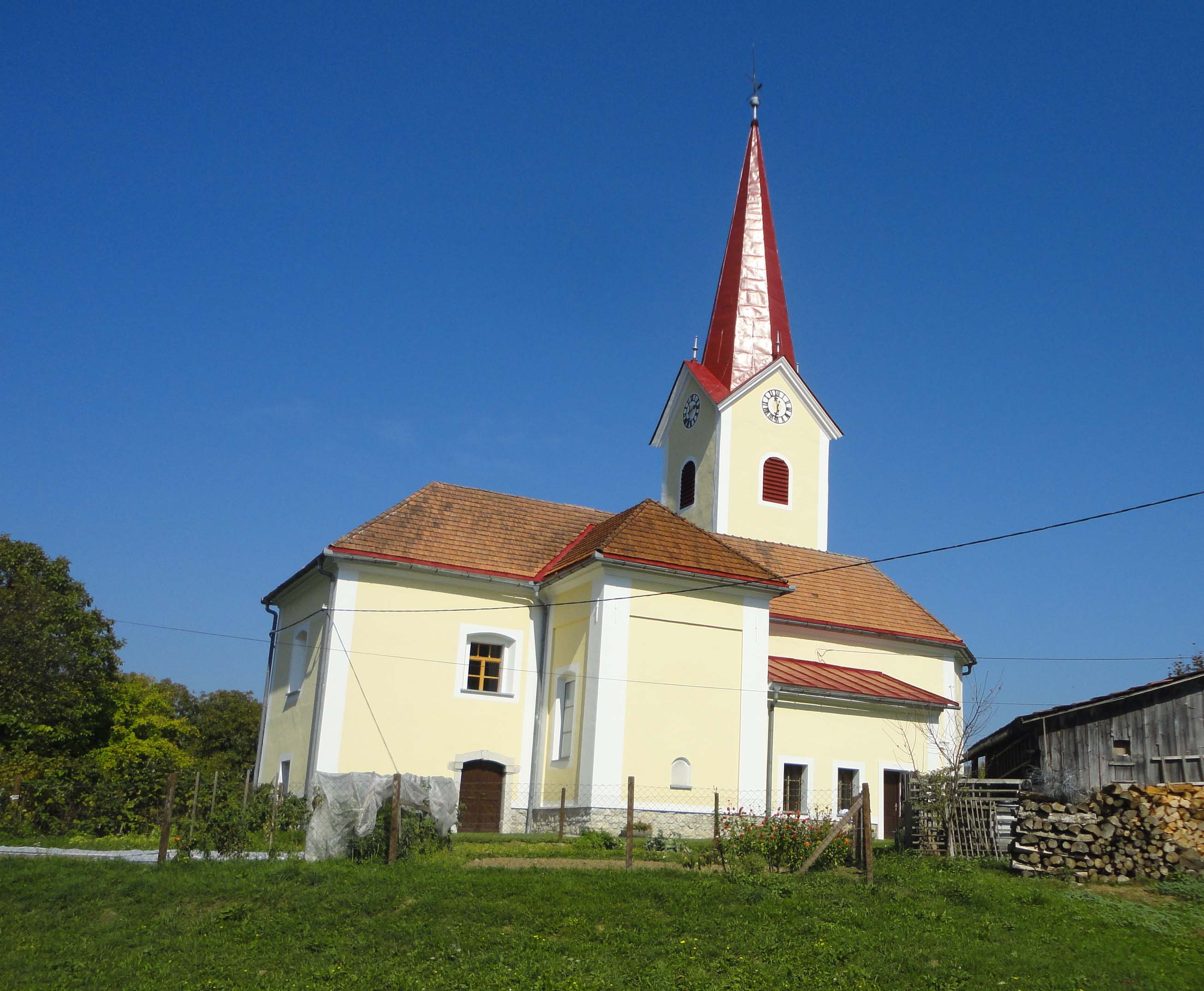 Mozelj pri Kočevju: cerkev